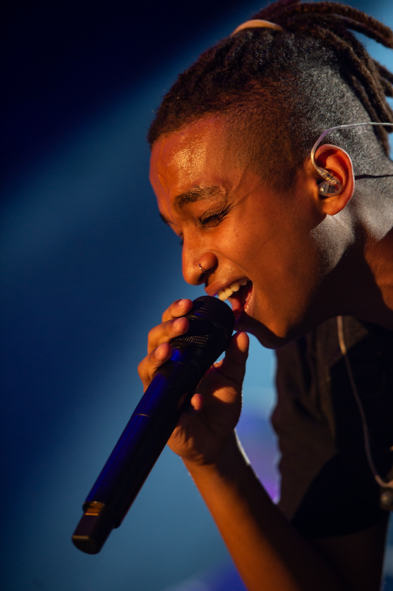 ARGO-Konzerte,Danyiom,Konzert,Livekonzert,Livemusik,Löwensaal